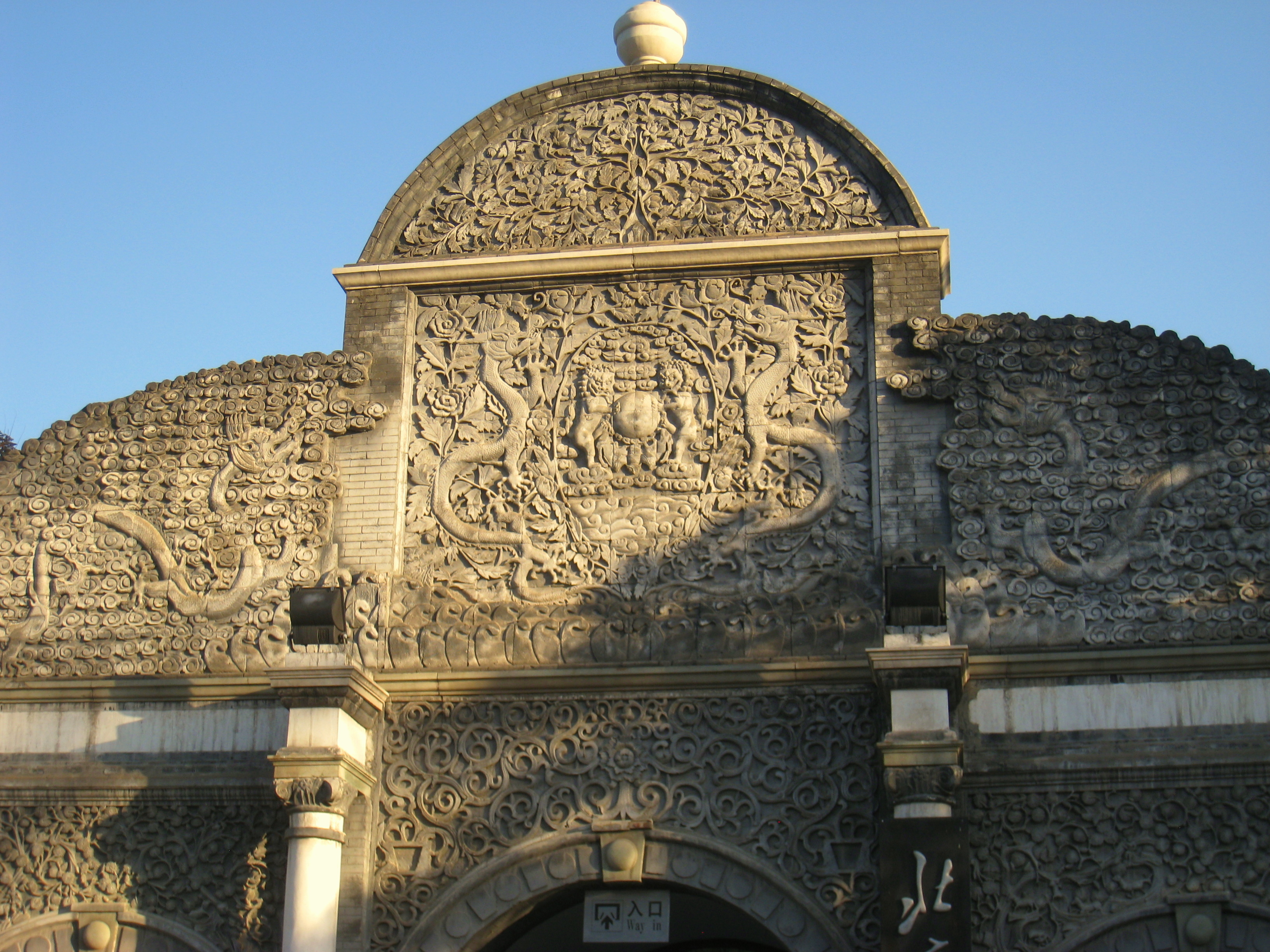 Beijing Zoo (北京动物园), Beijing, China.